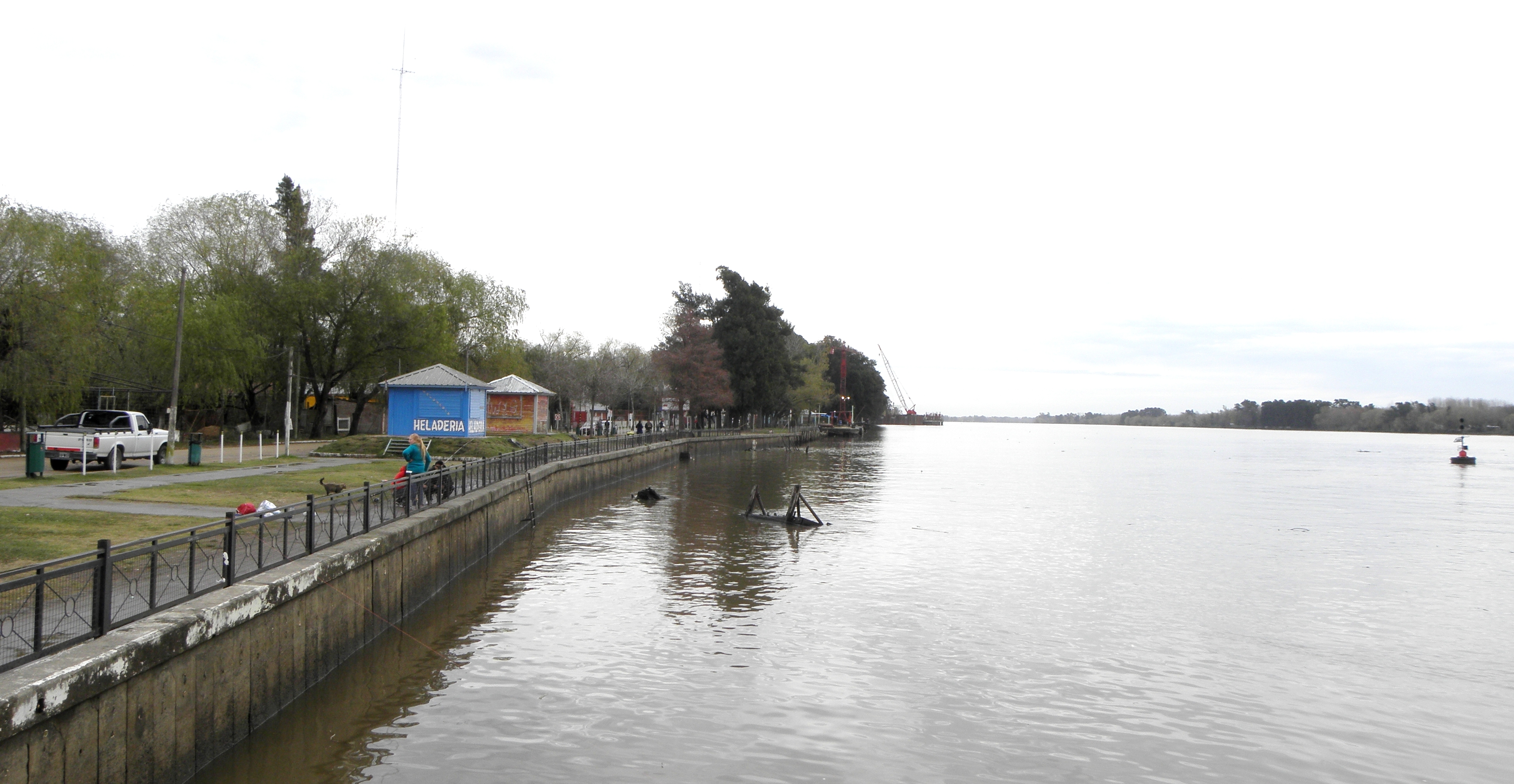 Costanera de Puerto Paraná, en pleno delta del Paraná, sobre la ribera del río Paraná de las Palmas, partido de Escobar, en la zona nordeste de la provincia de Buenos Aires, centro-este de la Argentina.